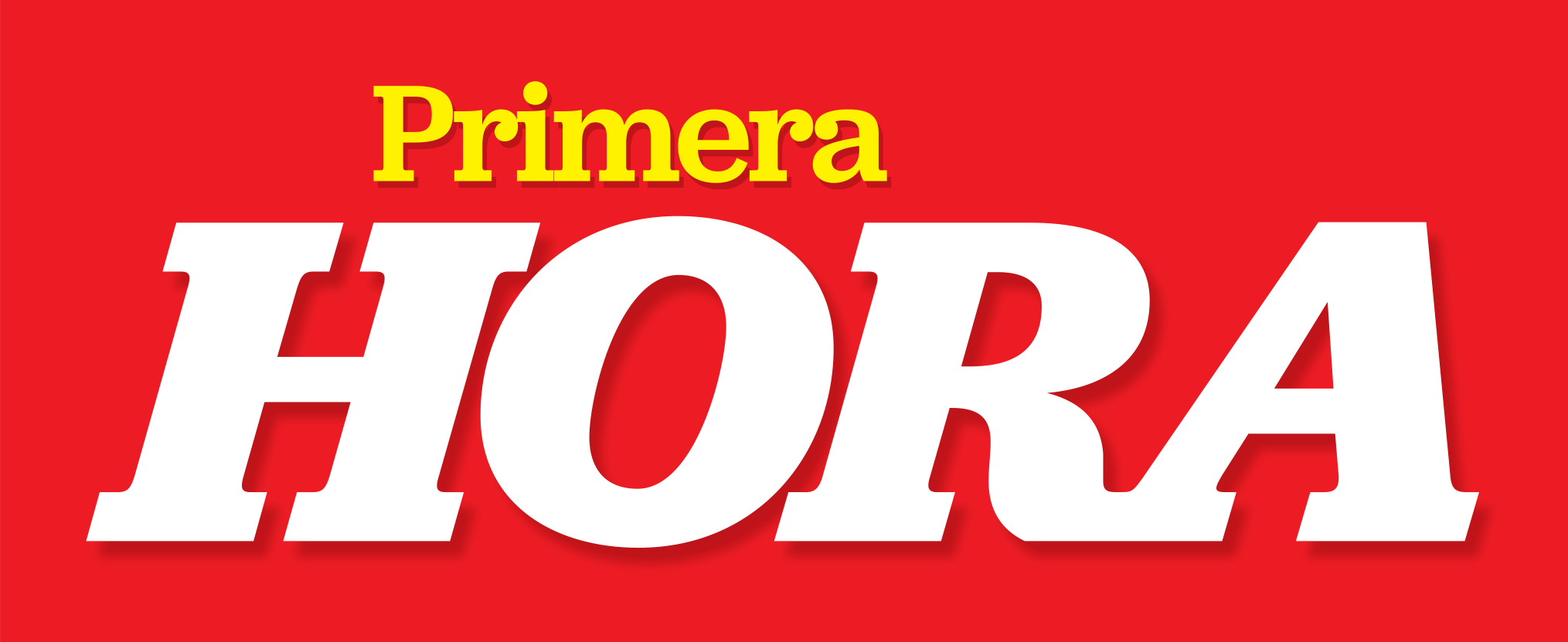 Logo oficial de Primera Hora